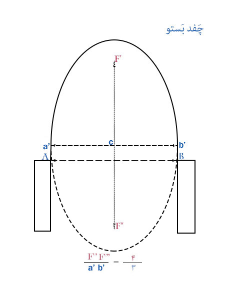 رسم چفد بستو